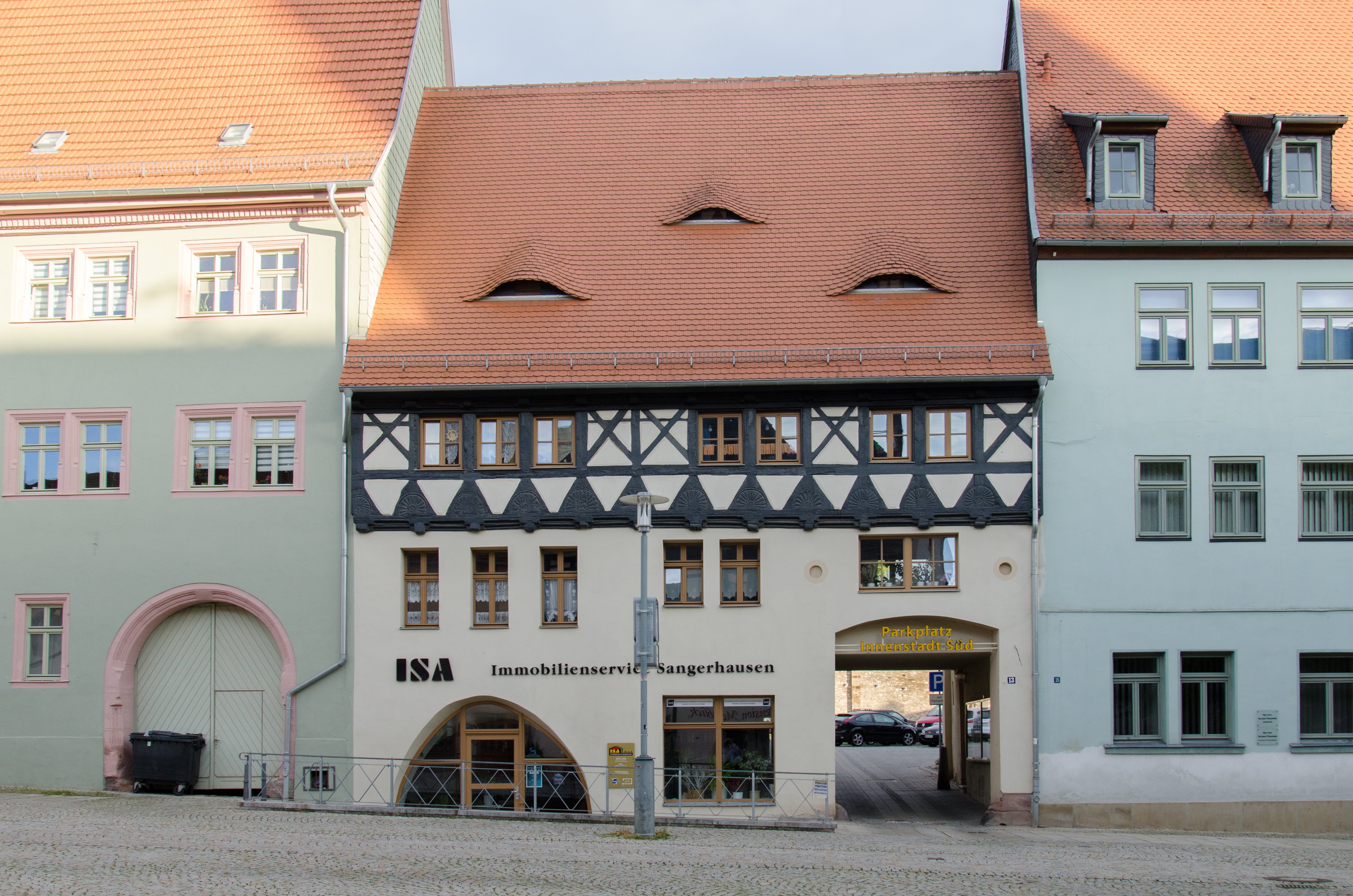 Sangerhausen, Markt 13